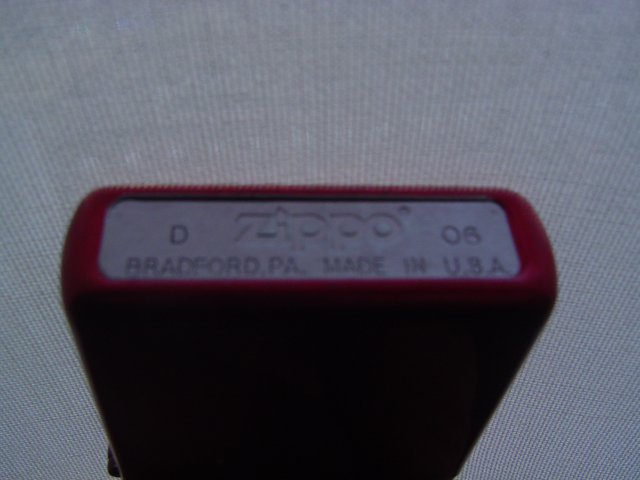 Zippo Chiusi